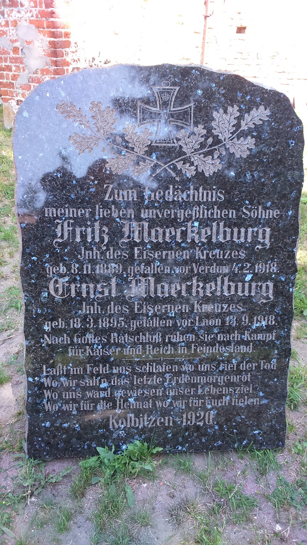 Tablica ku pamięci Ericka i Ernsta Maerkelburg odnaleziona w Sątocznie (Leunenburg) w czerwcu 2016 r.